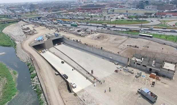 Inicio del tunel por debajo del Rio Rimac